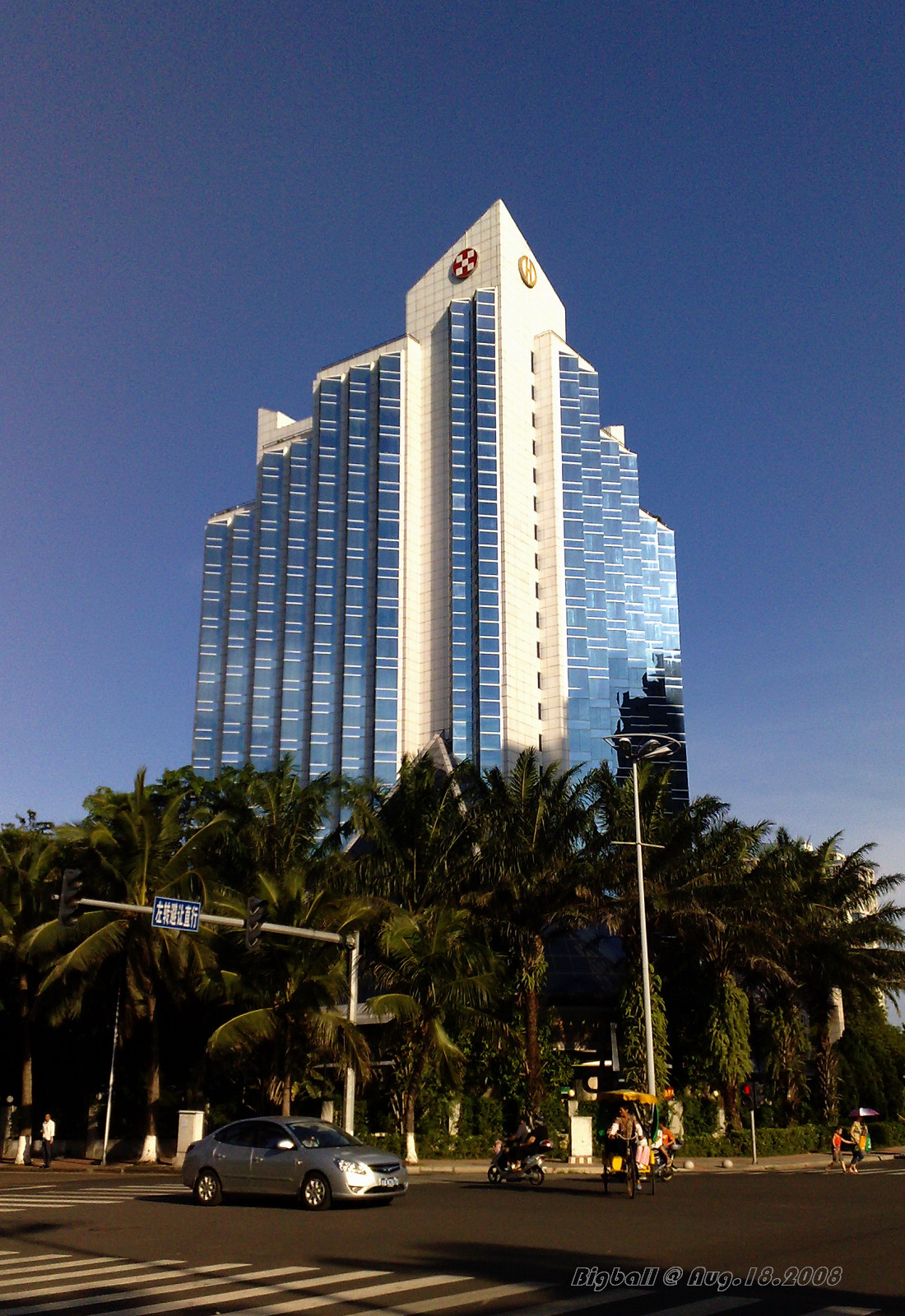 寰岛泰得大酒店-By Bigball